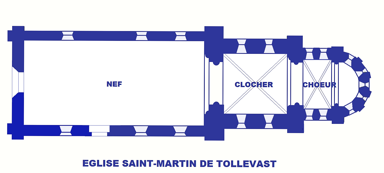 Eglise Saint-Martin de Tollevast (50), Plan